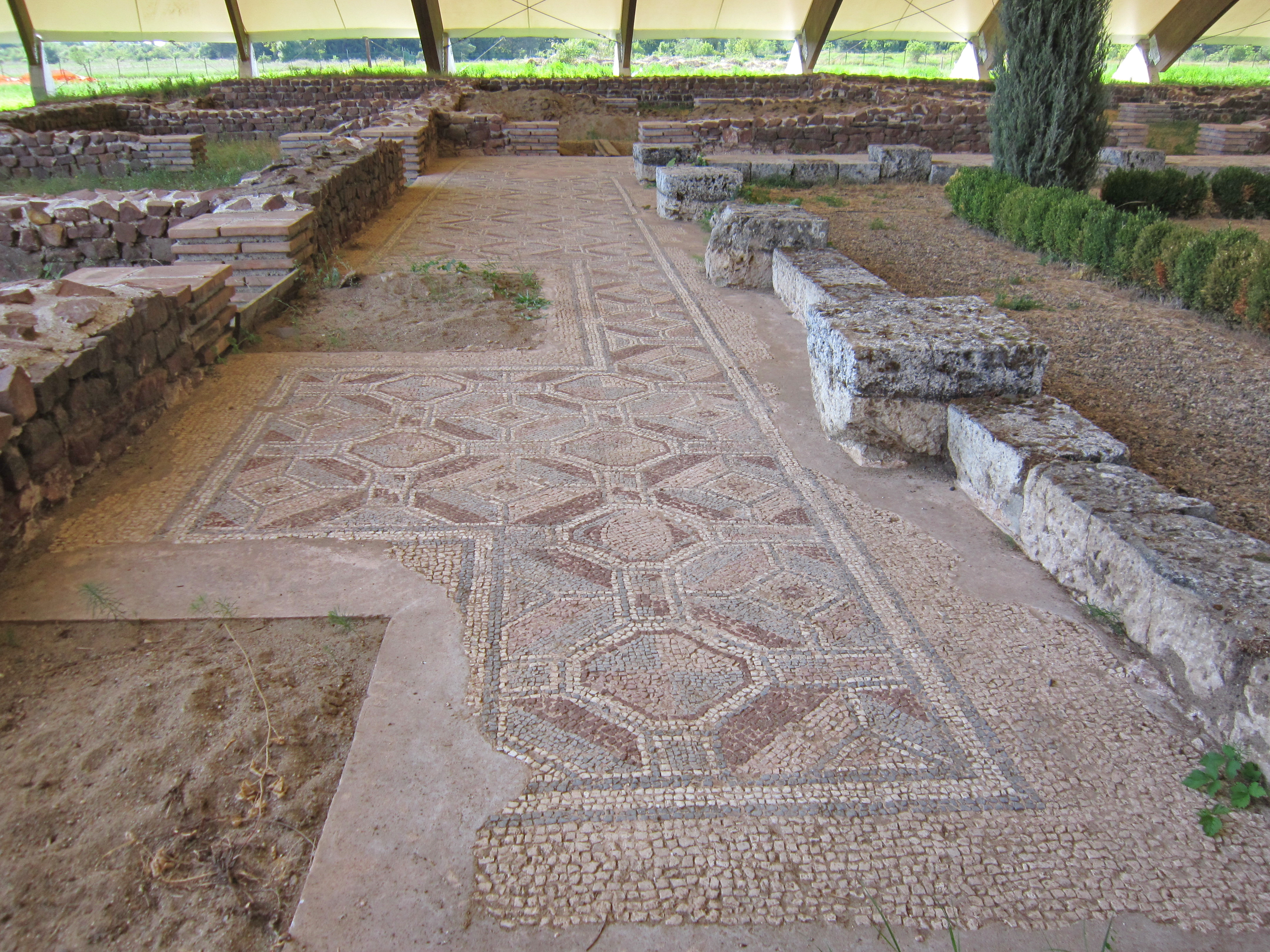 Српски (ћирилица): Медијана